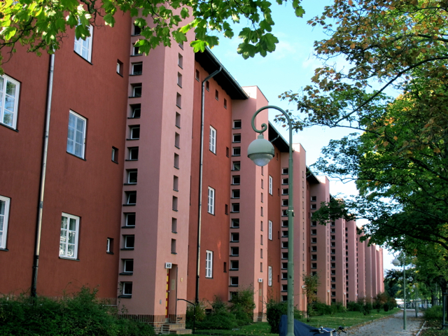 Hus längs med Fritz-Reuter-Allee i bostadsområdet Hufeisensiedlung i Berlin-Neukölln (Britz)